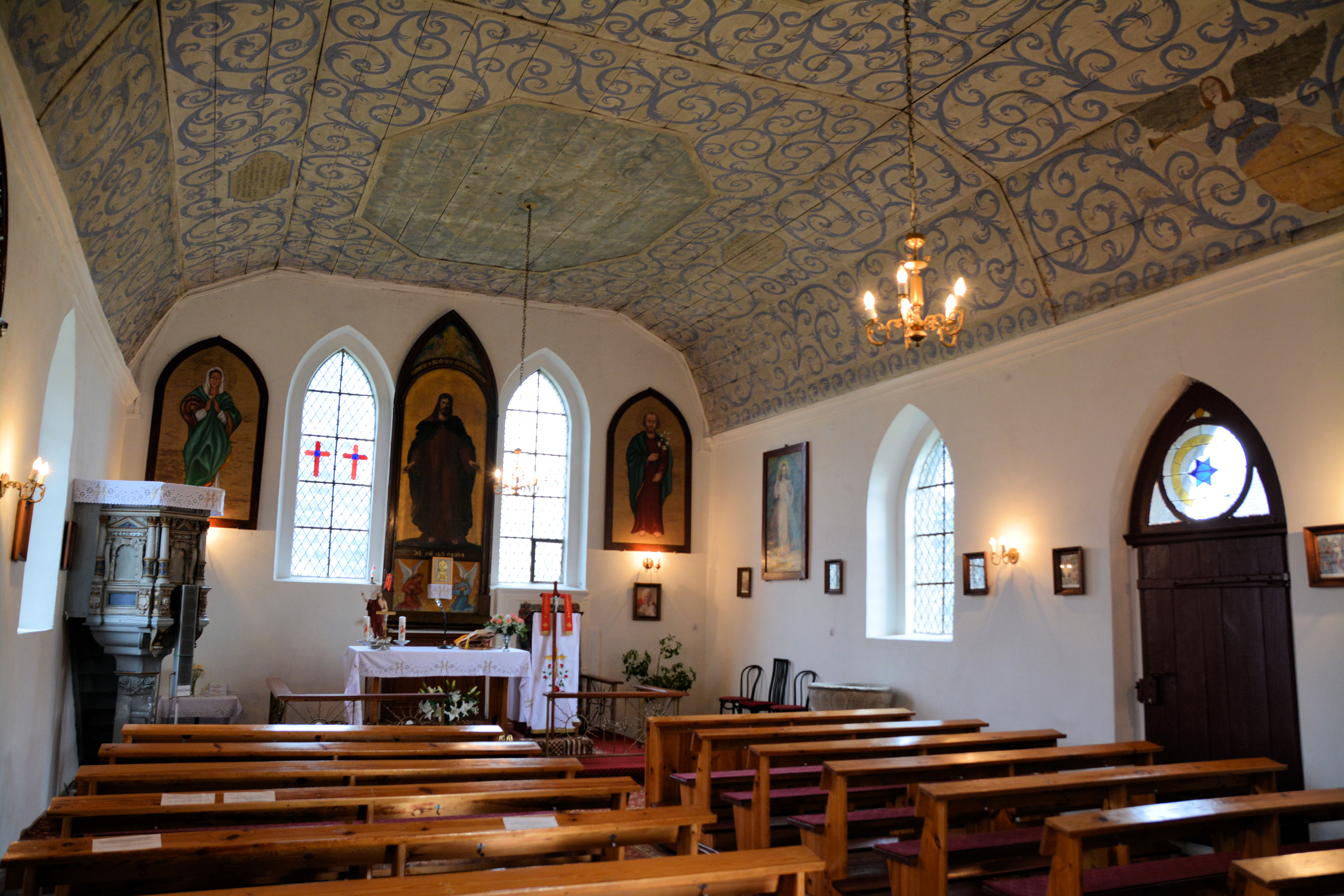 Mechowo - rzymskokatolicki kościół filialny p.w. św. Izydora, XIV, 1738, 1861